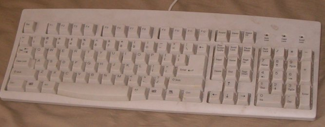 Tastiera per computer. Immagine prelevata da W/en, con ogni evidenza una delle più comuni tastiere, fotografata da eurleif.